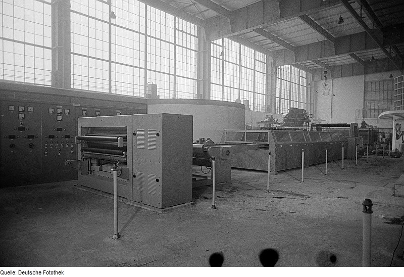 Original image description from the Deutsche Fotothek Textilindustriemaschine des VEB Kombinat Textima Karl-Marx-Stadt auf der Leipziger Herbstmesse 1954